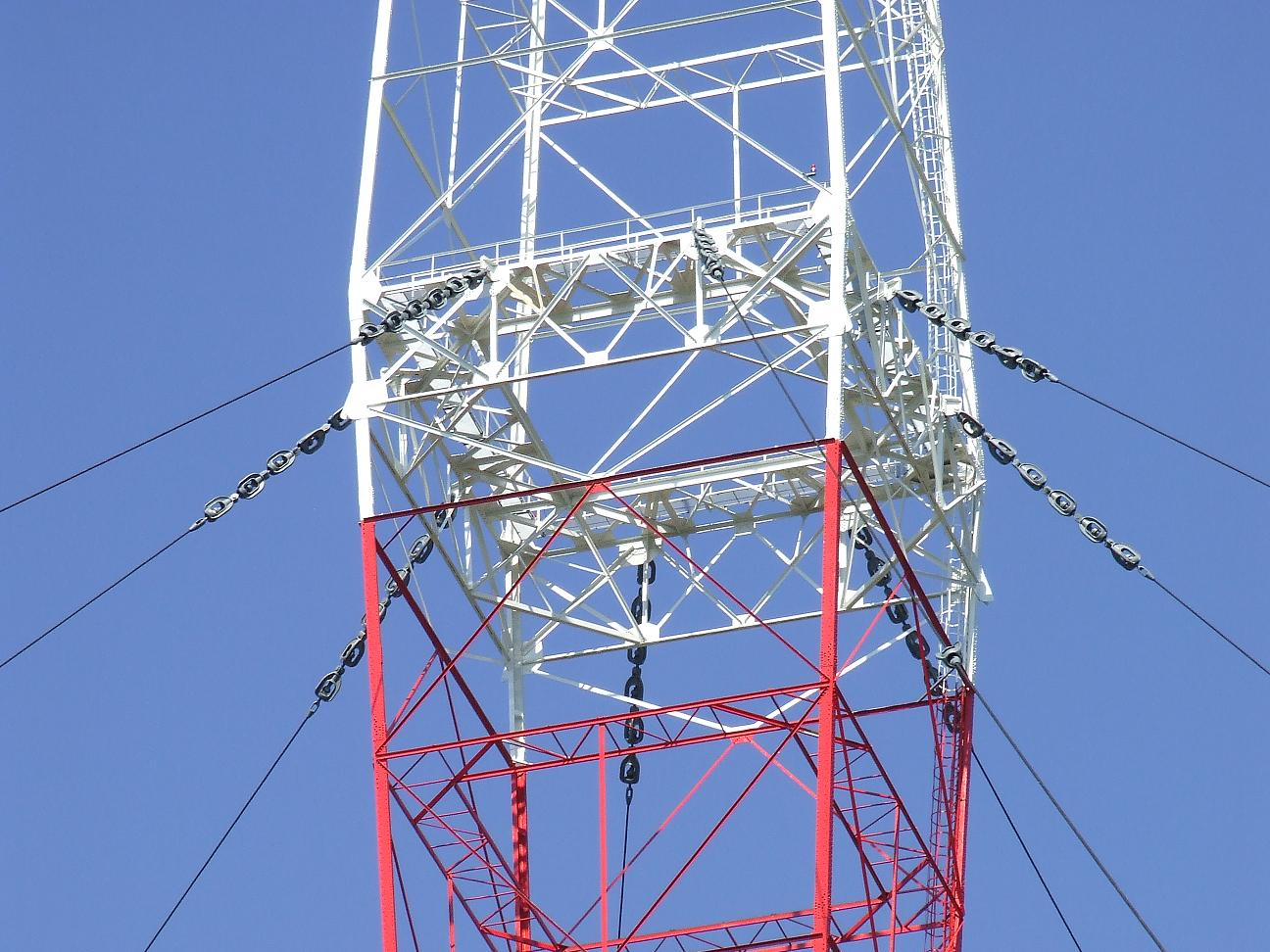 A lakihegyi adótorony középrésze 2007. szeptember 22-én.